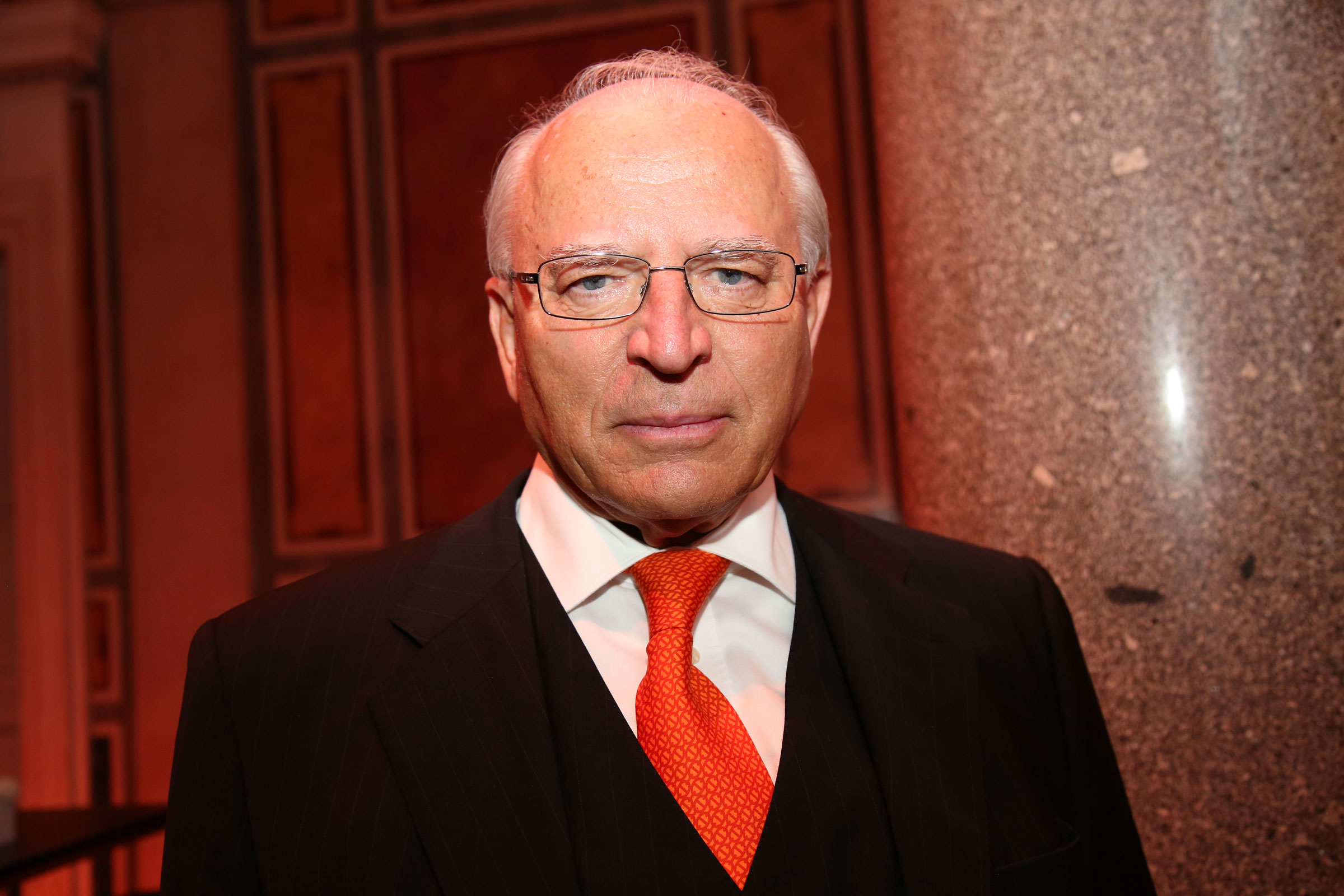 Claus Raidl, Österreichische Nationalbank, Laudator des Houska_preises